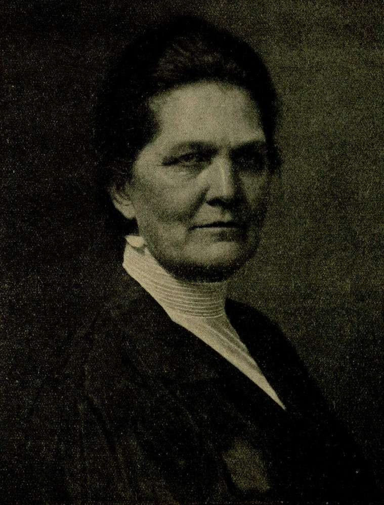 Porträt der Schriftstellerin und Heimatkundlerin Elisabeth Grabowski (1864–1929). Fotografiert von Max Glauer, Oppeln.